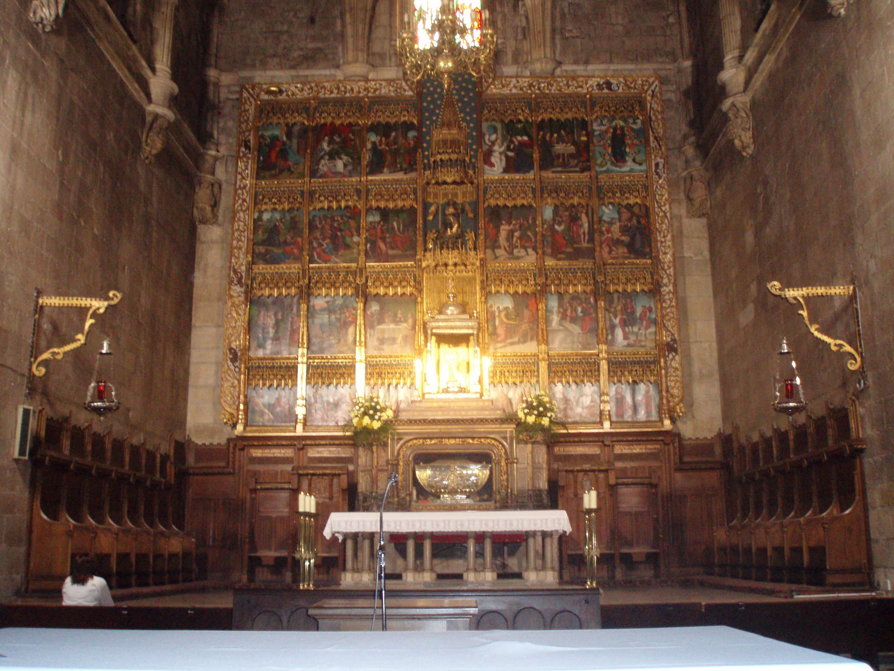 Altar mayor de la Colegiata de San Isidoro de León.